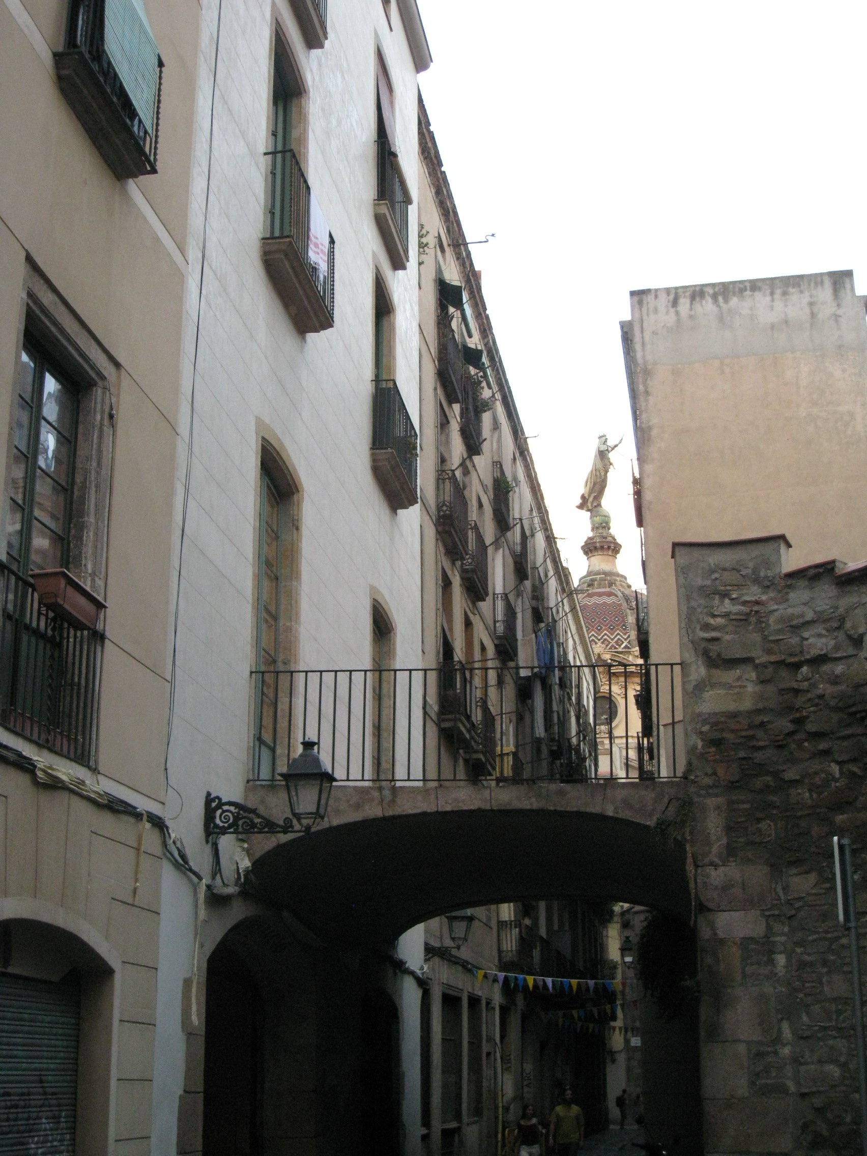 Edifici dels segles XVII-XVIII amb façana als carrers d'Avinyó núm. 52 i d'en Carabassa núm. 15, al barri Gòtic de Barcelona. A la imatge, la façana del carrer d'en Carabassa, amb el pont que comunica amb l'edifici del davant. Al fons, la cúpula de la basílica de la Mercè.